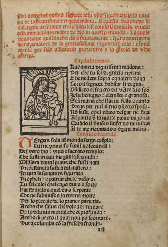 Tesauro spirituale. - Impressa a Milano : in casa de maistro Rigo Scinzenzeler, nel anno del signore MCCCCLXXXXII a di XVI del mese de martio. - 42 c. ; a-d⁸, e¹⁰ ; 8° .